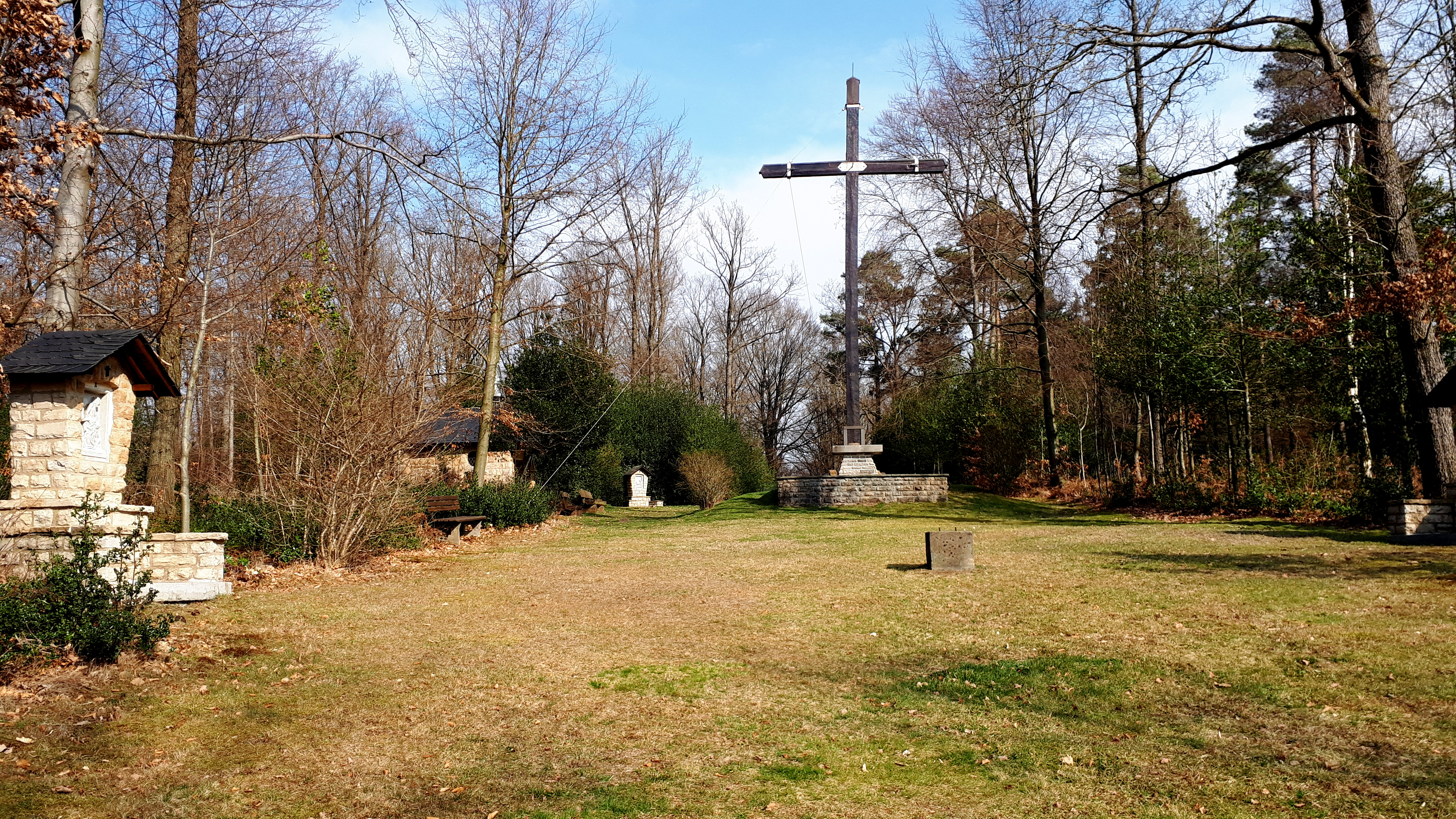 Kreuzwegstation auf dem Giersberg im Lehnsbachtal bei Rott/Roetgen